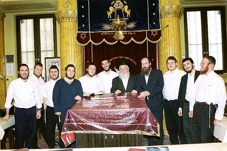 das erste Jahr der Jeschwa